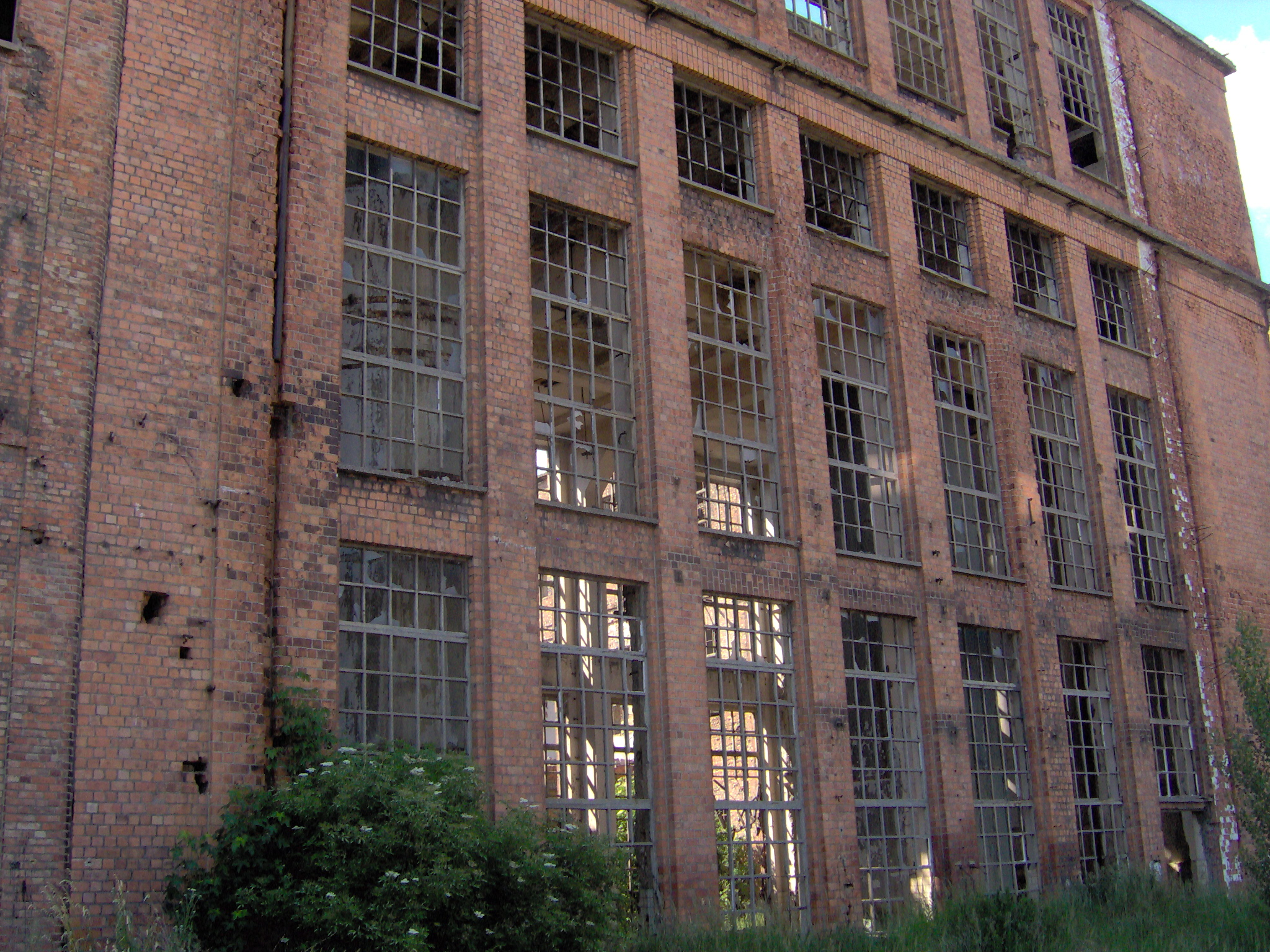 Pozostałości po celulozie (2007 r.)